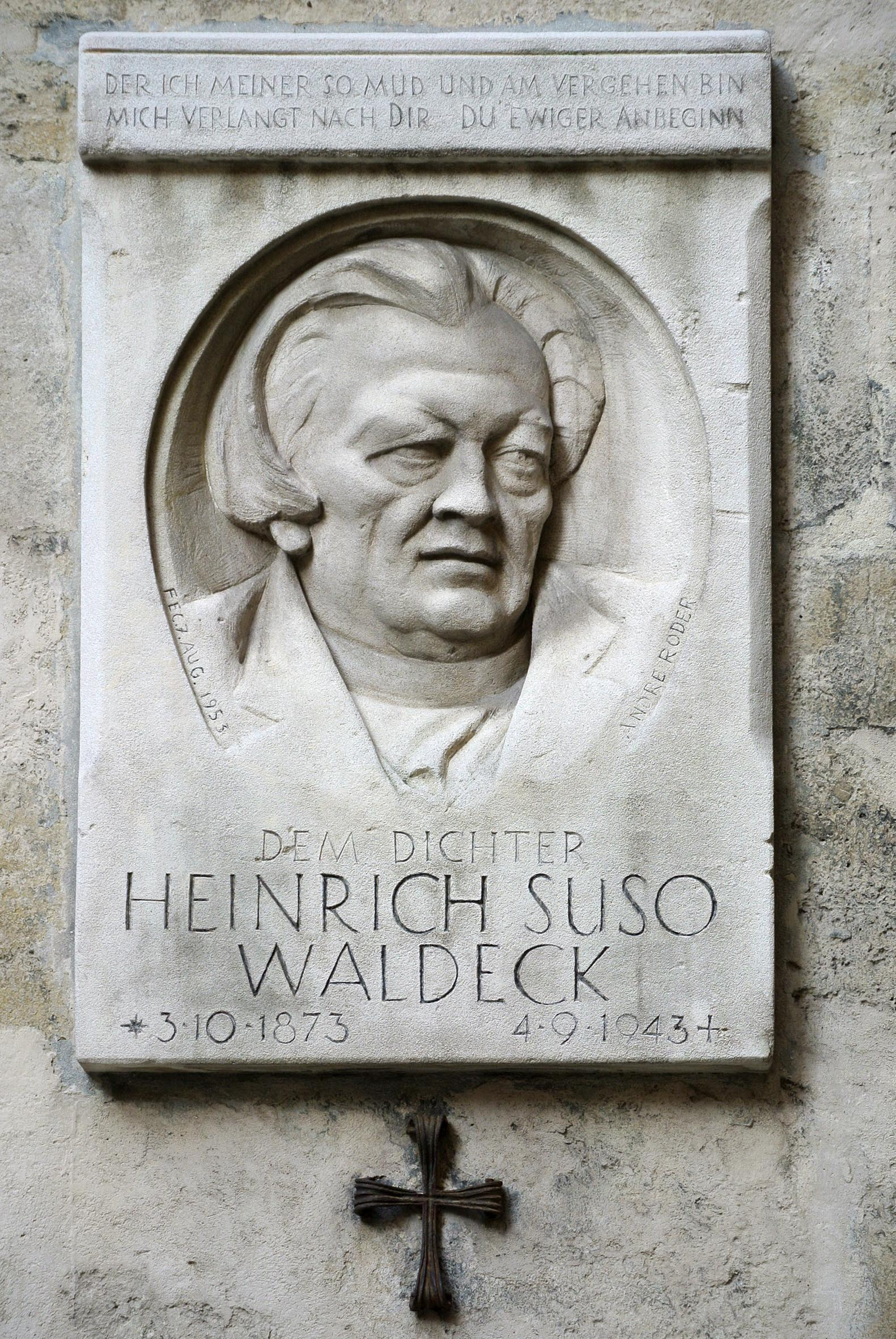 Waldeck Heinrich Suso, eigentlich Augustin Popp, österreichischer Schriftsteller, * 3. 10. 1873 Wscherau (Böhmen), † 4. 9. 1943 St. Veit (Oberösterreich); katholischer Geistlicher; Priester, Seelsorger, Schriftsteller, Lyriker, Journalist. Österreichischer Staatspreis 1937. Die Gedenktafel von Andre Roder (7.August 1953), befindet sich an der Außenmauer der Kirche "Maria am Gestade" in Wien 1.,Passauer Platz. Inschrift: Der ich meiner so müd und am Vergehen bin, mich verlangt nach dir, du ewiger Anbeginn.